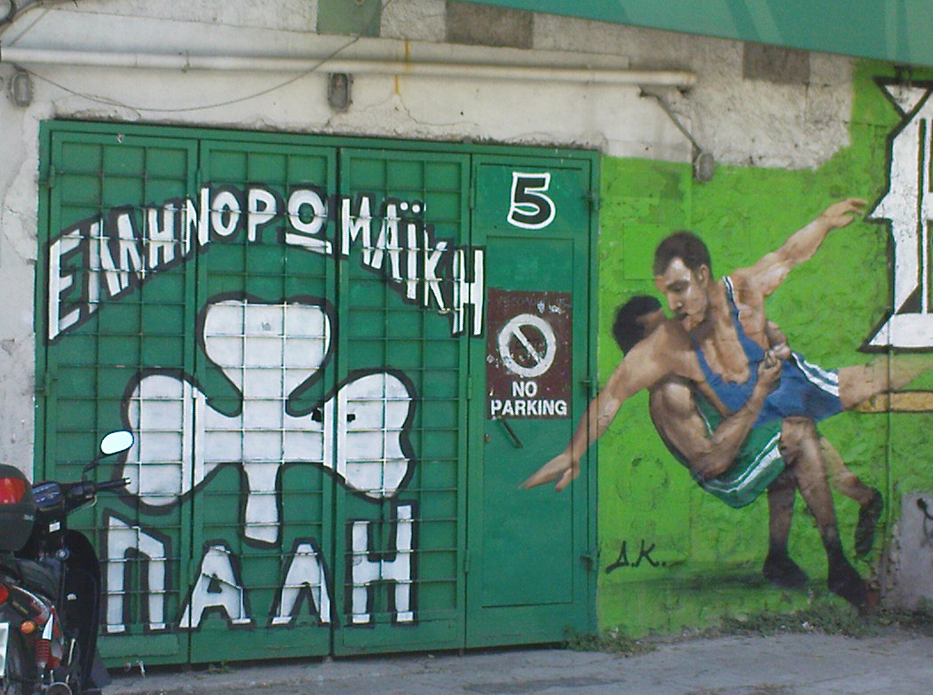 H είσοδος για το προπονητήριο της πάλης του Παναθηναϊκού στη θύρα 5 της Λεωφόρου